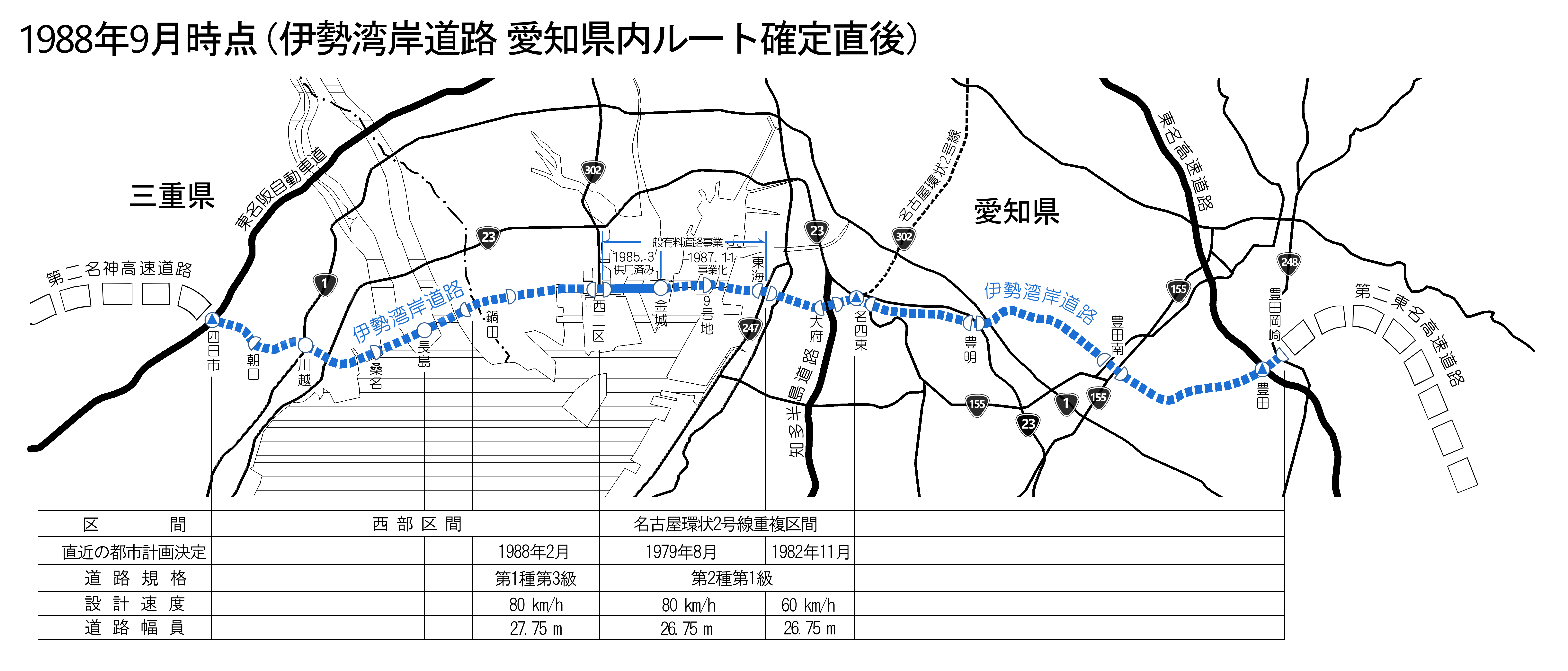 1988年9月時点の伊勢湾岸道路計画図（JPG形式）